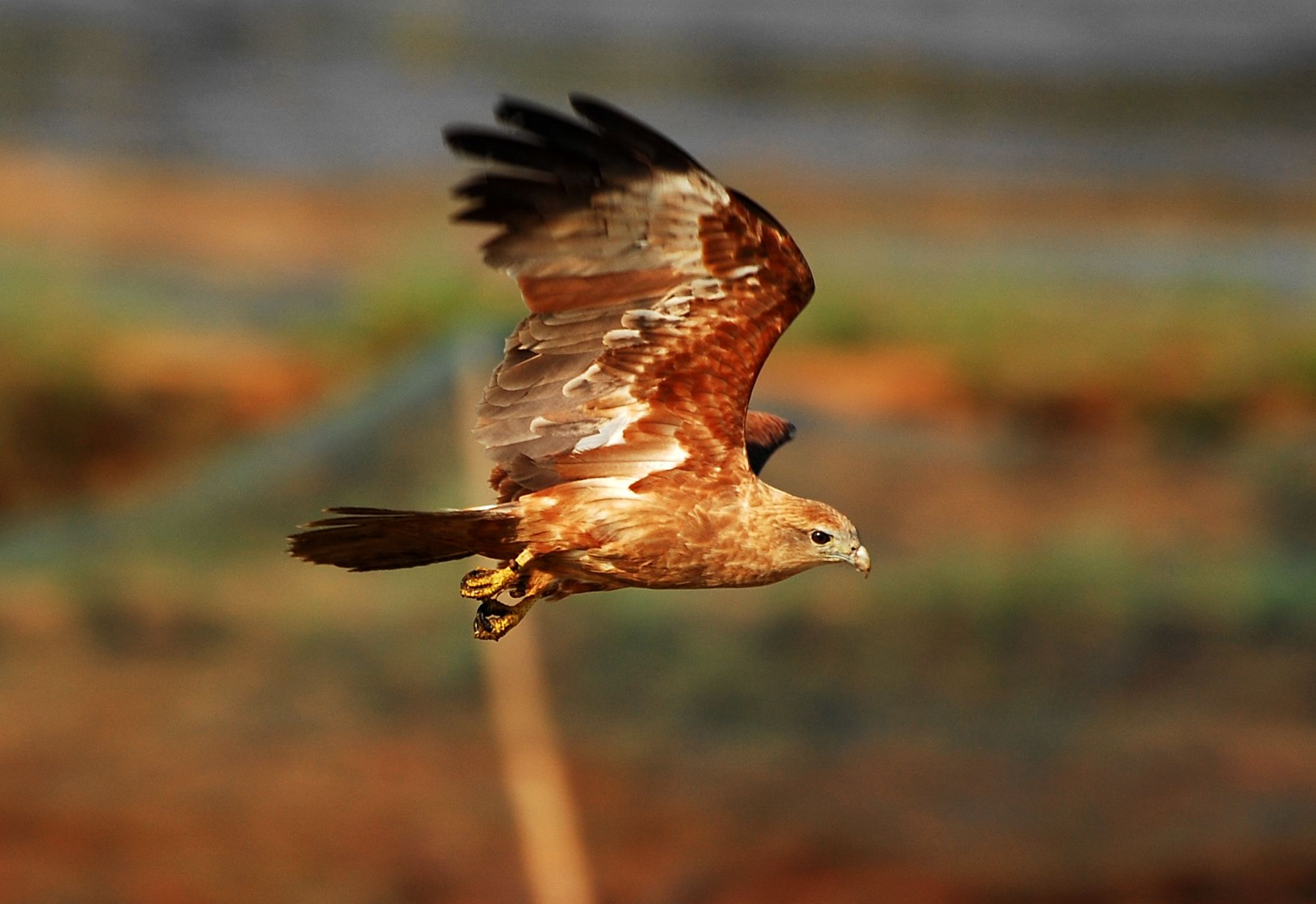 Brahminy Kite juvenile, Thommana, Chalakudy, Thrissur, Kerala, India.